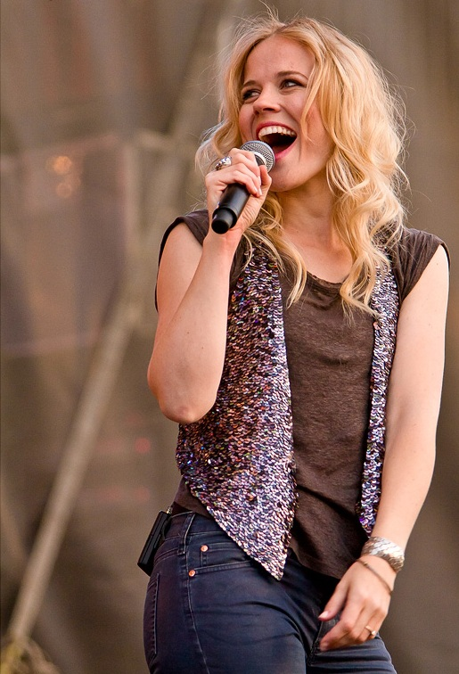 Optreden van Ilse DeLange op het Bevrijdingsfestival Overijssel te Zwolle